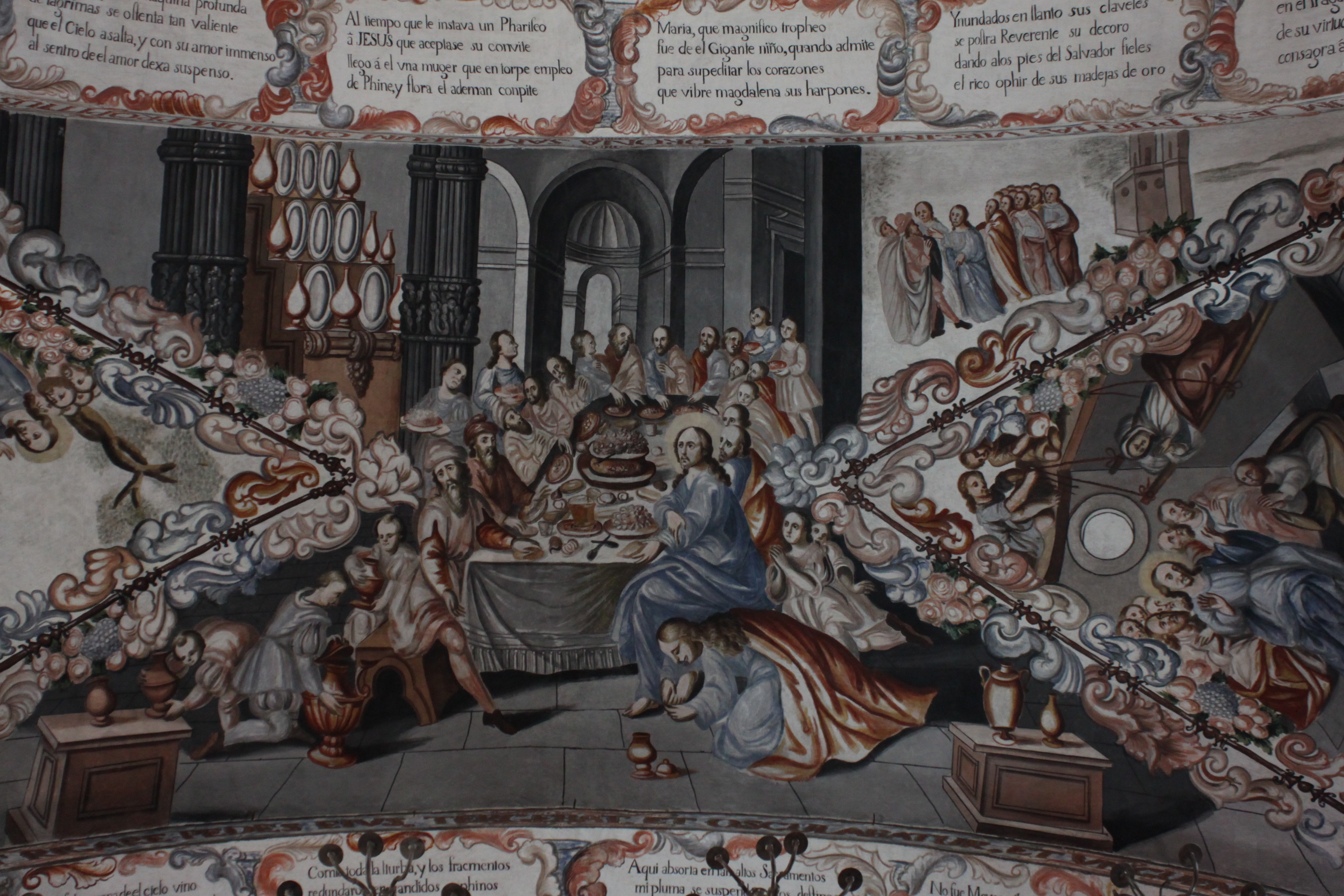 Parroquia de Jesús Nazareno